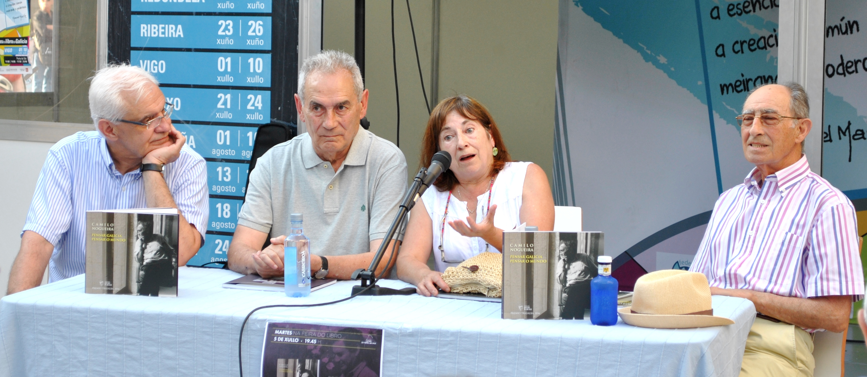 Presentación do libro Pensar Galicia, Pensar o mundo de Camilo Nogueira Román na Feira do Libro de Vigo 2016. Fotografía tirada ao aire libre na vía pública, na Porta do Sol de Vigo.